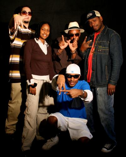 Arawak Sound System